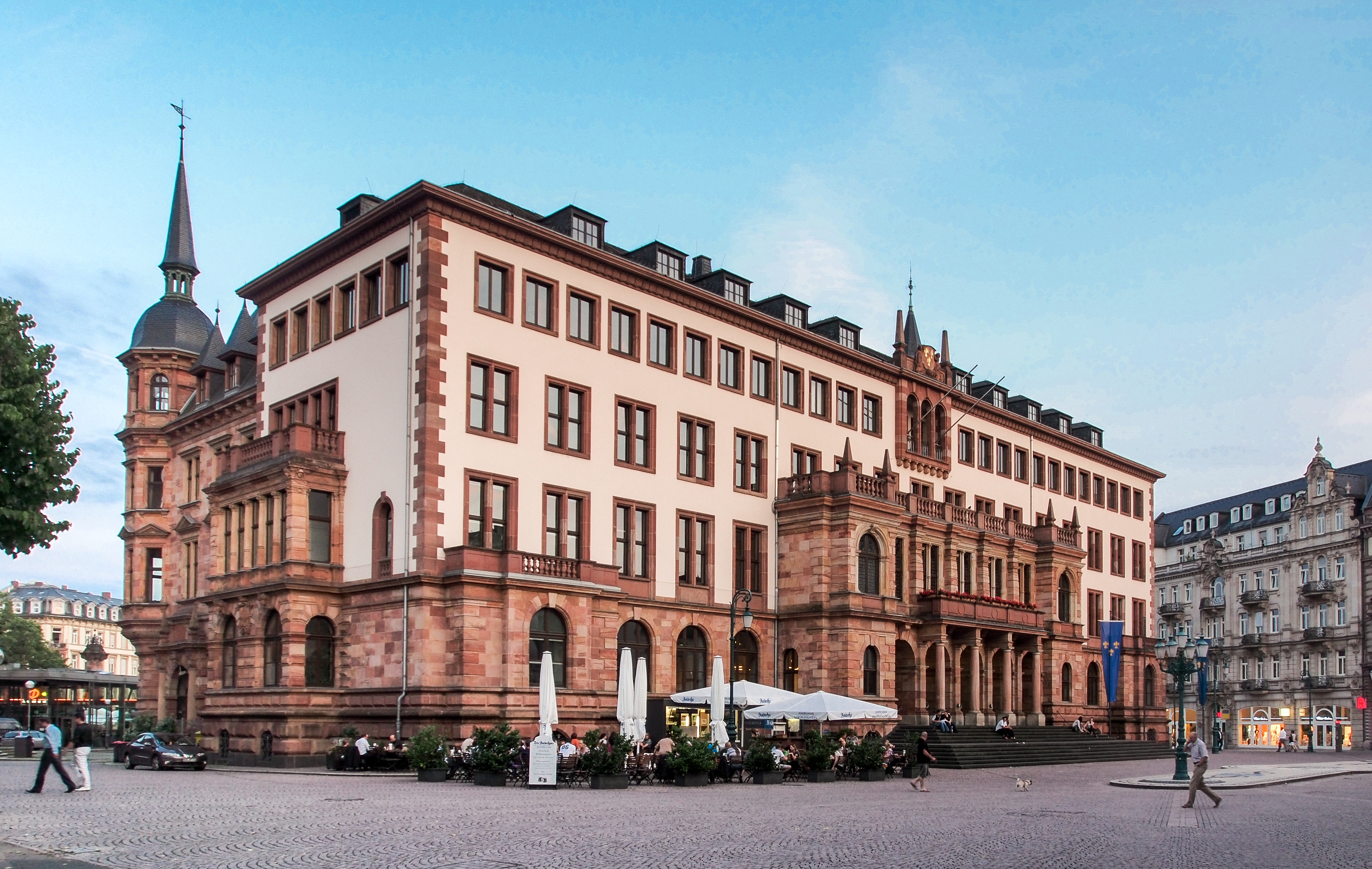 Wiesbaden Neues Rathaus, Ansicht von Norden